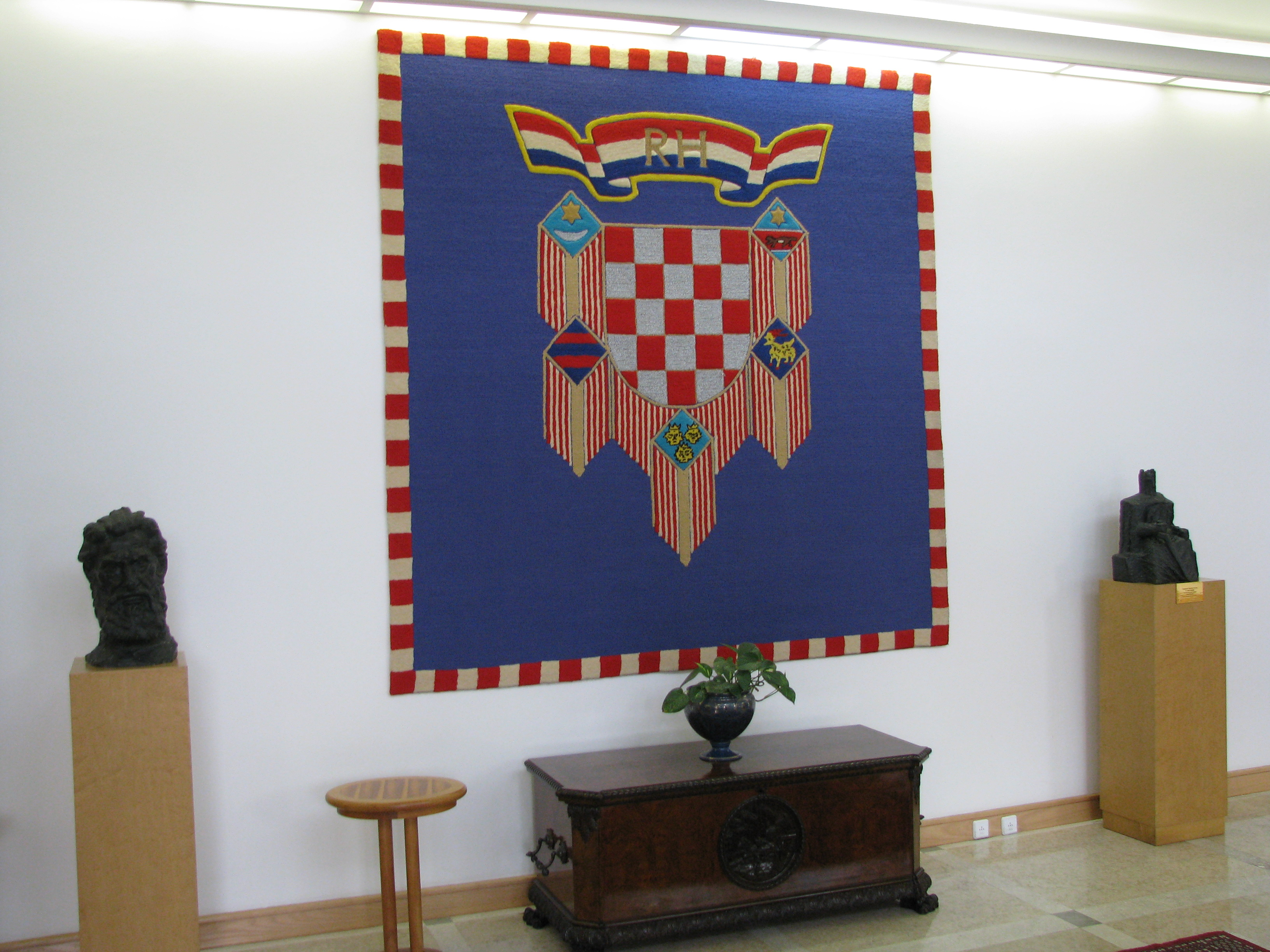 Ured predsjednika Repubilike Hrvatske. Tapiserija zastave predsjednika Republike. Na lijevo strani se nalazi bista Ante Starčevića, desno kralja Tomislava